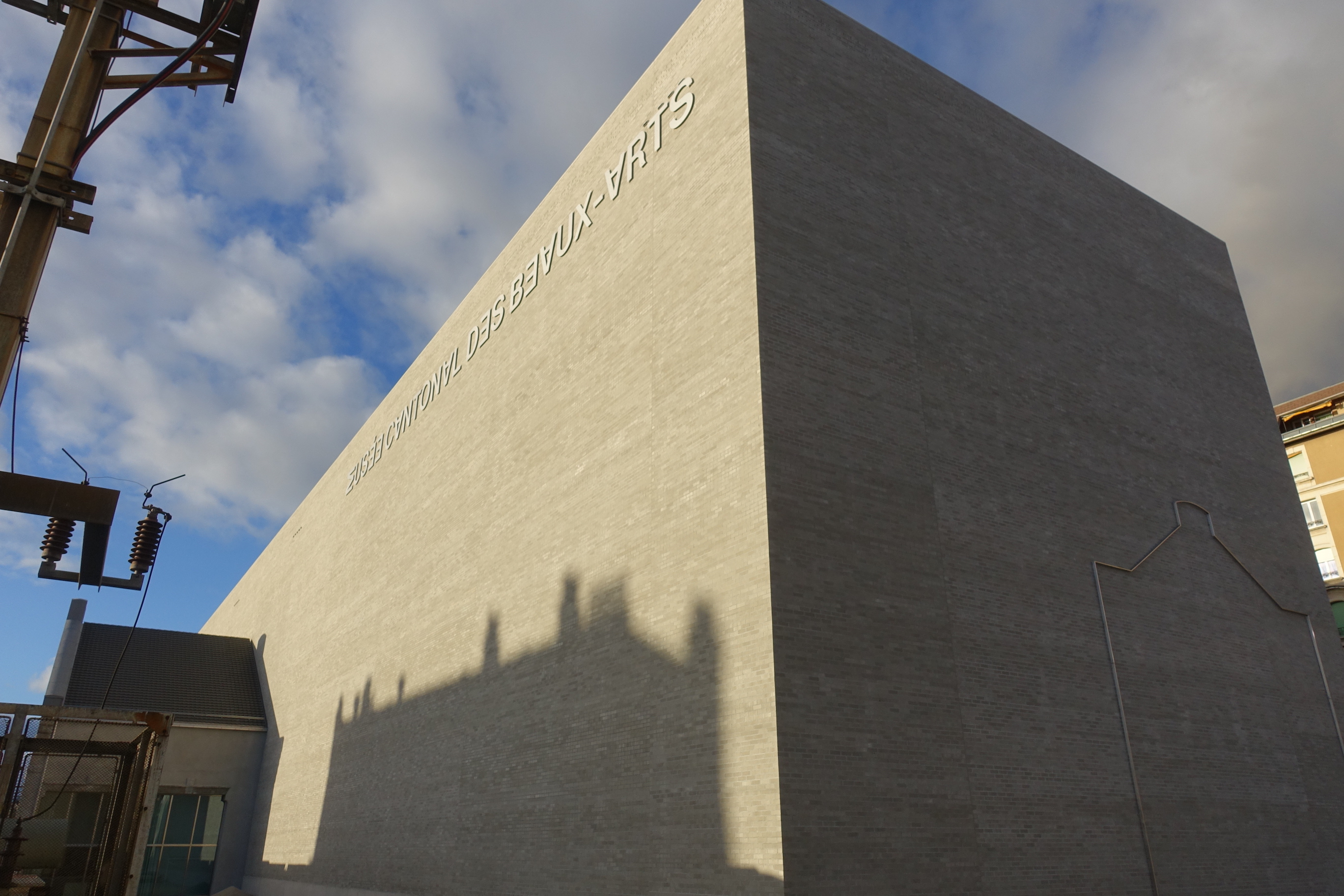 Musée cantonal des Beaux-Arts à Lausanne (Plateforme 10), extérieur. Façade sud, ombre portée du bâtiment au chemin des Epinettes 6.